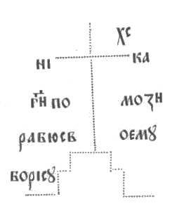 Прорисовка надписи на Борисовом камне в Полоцке.